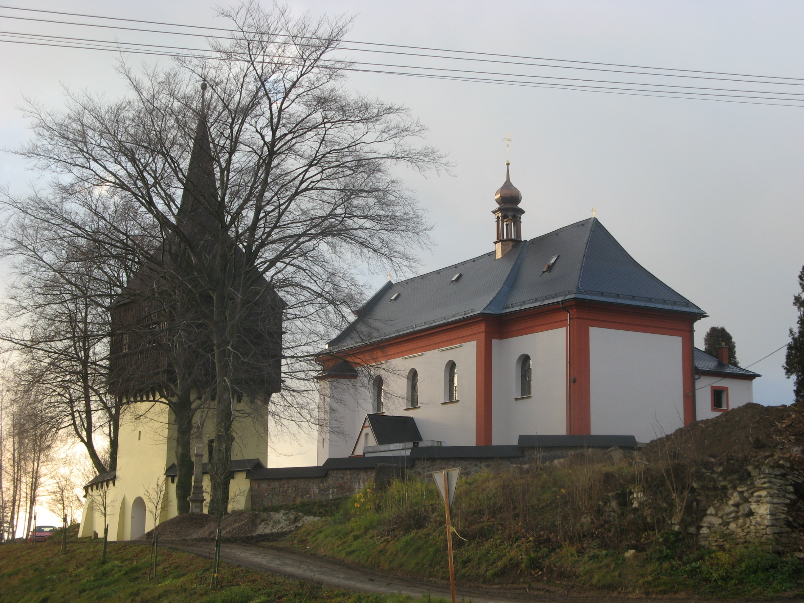 Kostel sv. Máří Magdaleny, Kamenná Horka, okres Svitavy